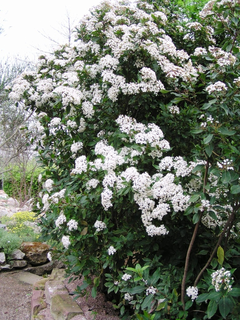 Viburnum tinus im Schau- und Lehrgarten Gunzenbach